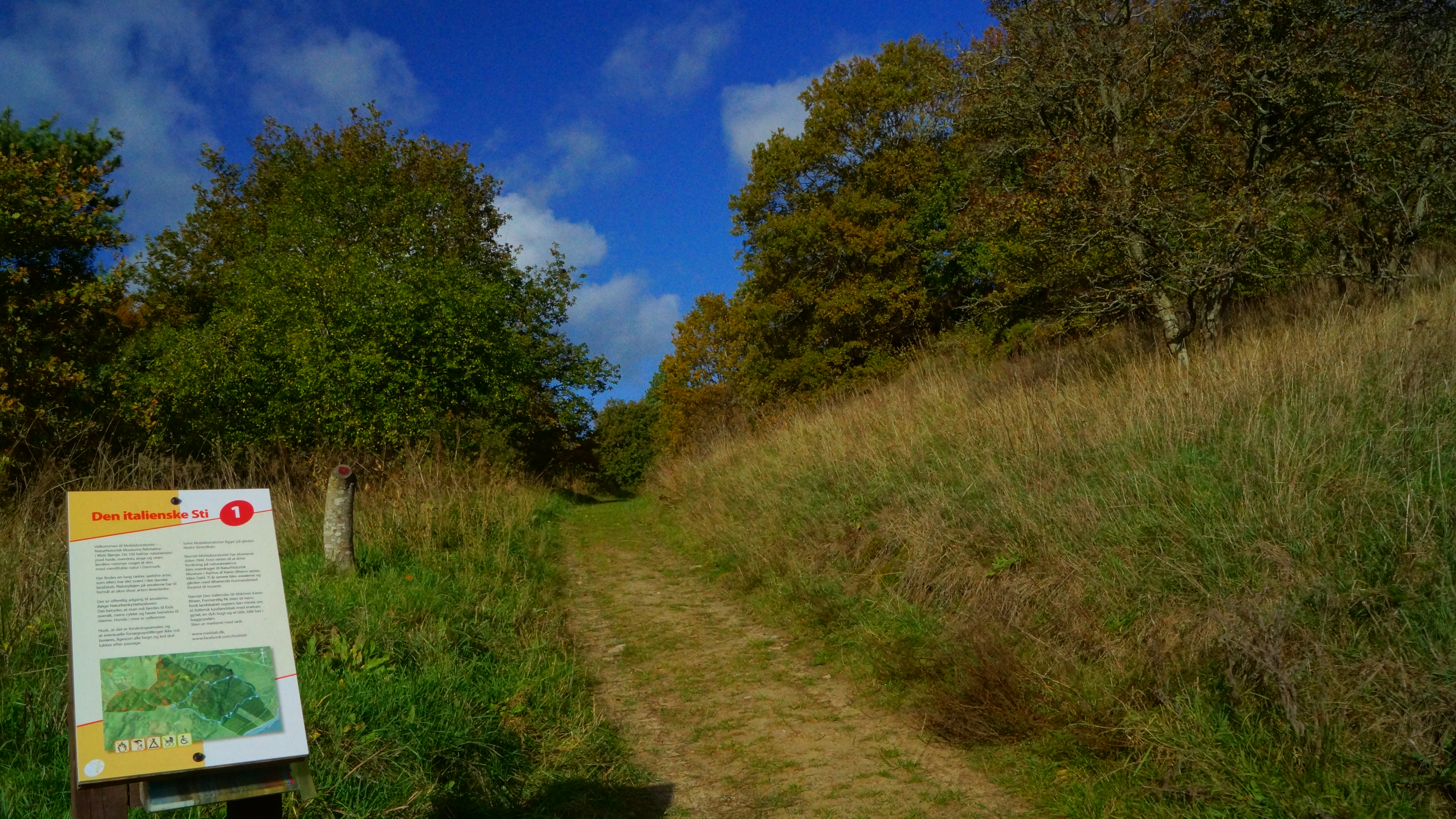 Den Italienske Sti, stander